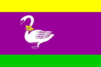 Vlag gemeente Zijpe (gemeente)